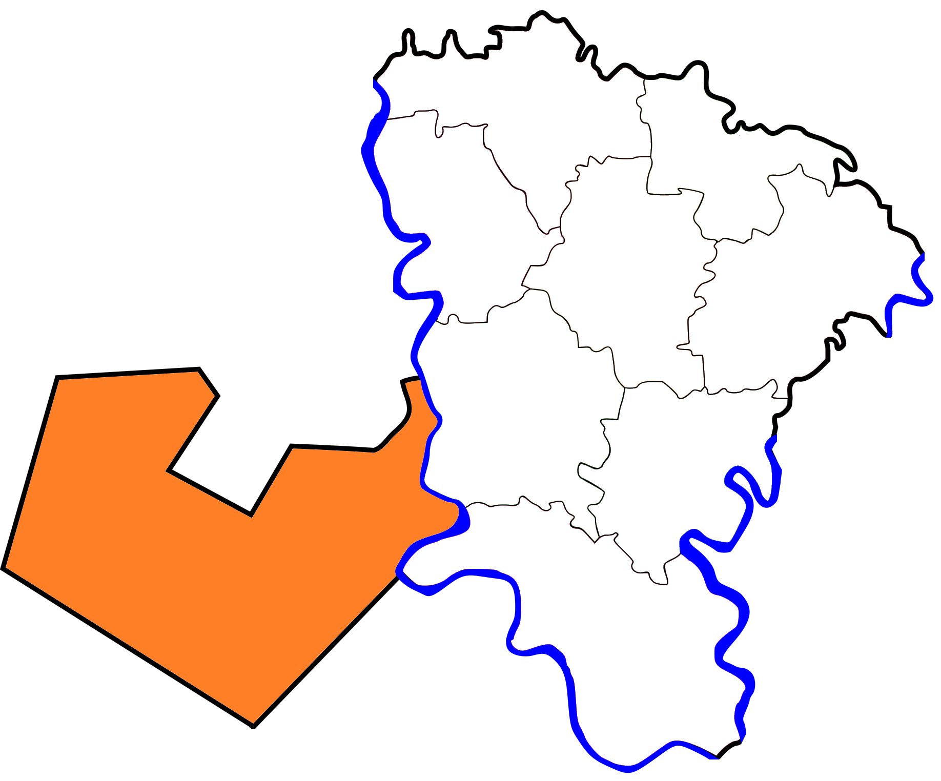 خريطة مركز السادات بالنسبة لمحافظة المنوفية، مصر.